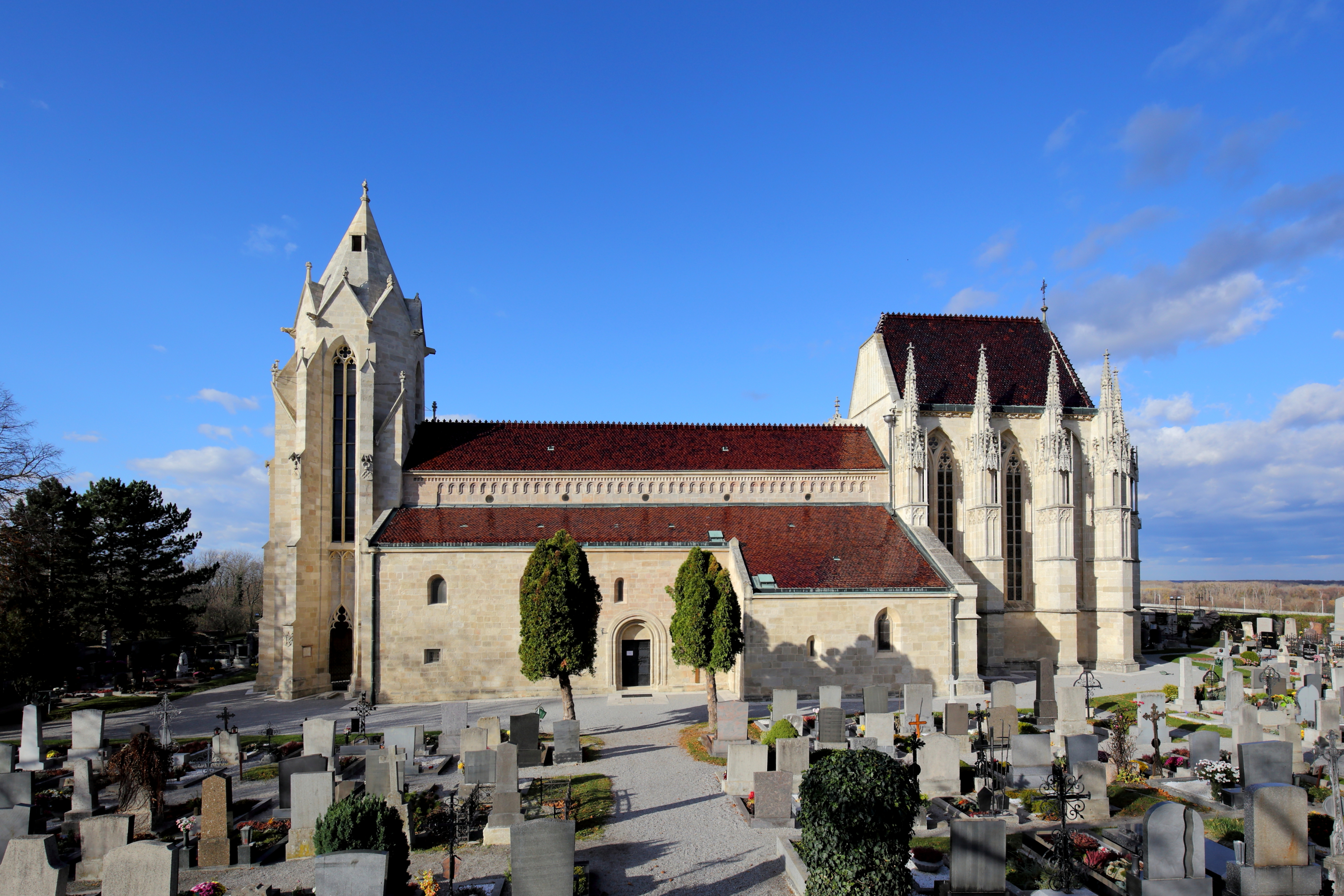 Südsüdostansicht der Pfarr- und Wallfahrtskirche Mariae Himmelfahrt in der niederösterreichischen Marktgemeinde Bad Deutsch-Altenburg. Die Kirche wurde erhöht über dem Ort auf einer zur Donau steil abfallenden Terrasse errichtet und ist vom Friedhof und einer Umfassungsmauer aus Bruchsteinen umgeben. Das Langhaus ist eine romanische, dreischiffige und sechsjochige Pfeilerbasilika. Der vorgestellte hochgotische Turm im Westen stammt aus dem 3. Viertel des 14. Jahrhunderts. Der erhöhte, zweijochige gotische Chor wurde vermutlich vom Baumeister Michael Knab Ende des 14. Jahrhunderts errichtet. Insgesamt ist das Bauwerk ein bedeutendes Denkmal mittelalterlicher Architektur in Österreich.